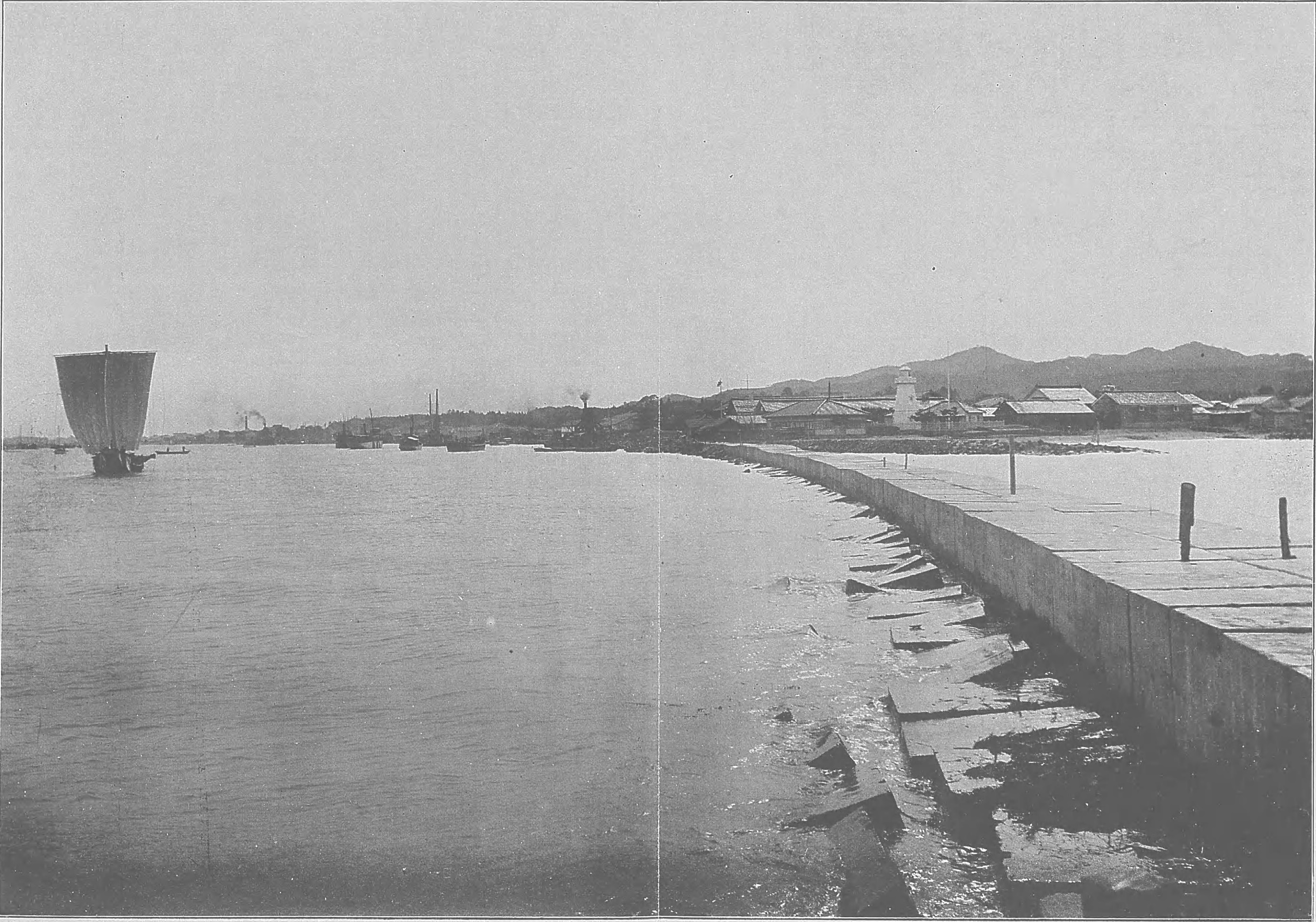 説明文に「小矢部川の河口中越鉄道の終点に在り特別輸出港にして日本海岸屈指の埠頭なり港内水深くして船舶常に輻湊し帆檣林立す小矢部川及び中越鉄道は運輸交通を便にして物資の聚散甚盛なり海岸の燈台は明治十年の設置に係り第五等不動白色にして光輝十里に達す」とあり